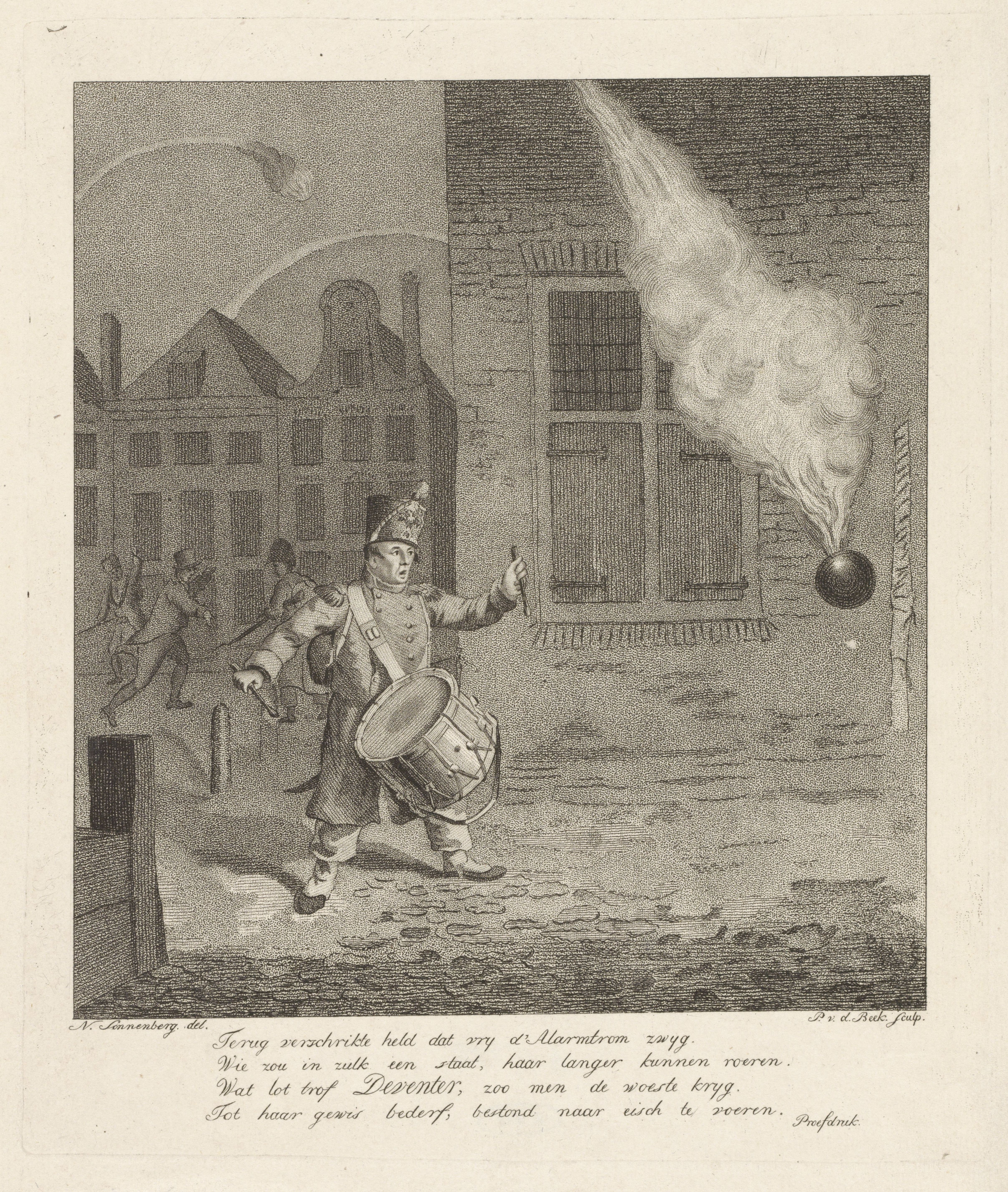 IdentificatieTitel(s): Soldaat met trommel schrikt van kanonskogel tijdens beleg van Deventer door de Fransen in 1813Objecttype: prent Objectnummer: RP-P-1891-A-16558Catalogusreferentie: FMH 5836Opschriften / Merken: verzamelaarsmerk, verso midden onder, gestempeld: Lugt 2228Omschrijving: Soldaat loopt bij avond door straten van Deventer en slaat op trommel om bewoners te alarmeren voor aanval van Fransen tijdens beleg van Deventer in 1813. Een kanonskogel vliegt over de Brink. Onder de voorstelling staat een vers in vier regels over de geschrokken soldaat.VervaardigingVervaardiger: prentmaker: Pieter van der Beek (vermeld op object)naar tekening van: Nicolaas Sonnenberg (vermeld op object)Datering: 1813 - 1821Fysieke kenmerken: proefdruk van ets en aquatintMateriaal: papier Techniek: etsen / aquatintAfmetingen: plaatrand: h 263 mm × b 219 mmToelichtingPrent naar tekening van Nicolaas Sonnenberg.OnderwerpWat: Franse periodeWaar: BrinkVerwerving en rechtenVerwerving: aankoop okt-1891Copyright: Publiek domein